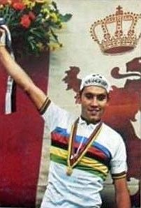 Eddy Merckx champion du monde sur route 1974, de retour à Bruxelles (Sprint 74' cover), Panini figurina.